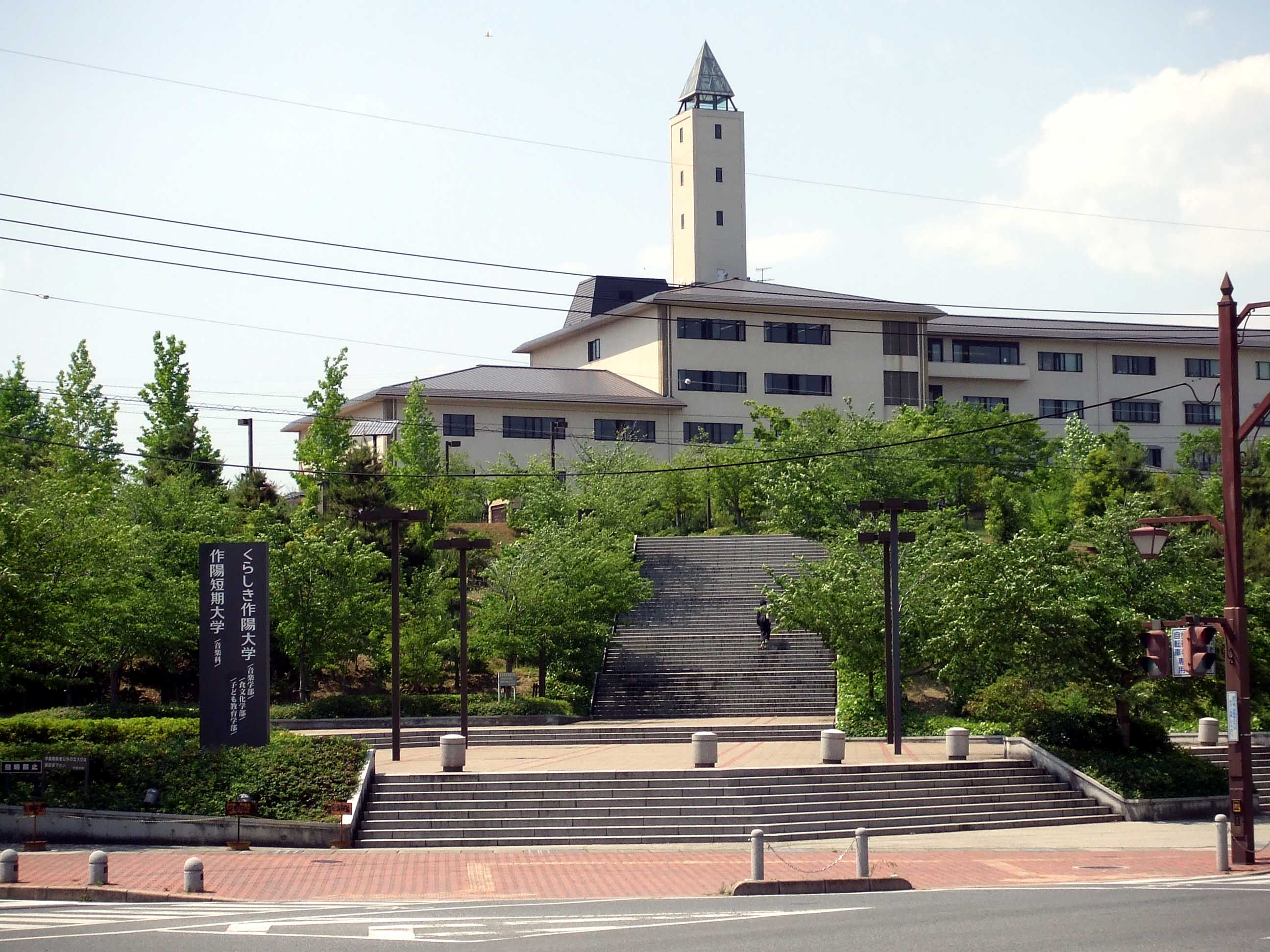 くらしき作陽大学、岡山県倉敷市玉島